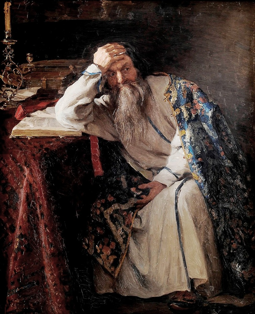 Клавдий Васильевич Лебедев (1852-1916). Иван Грозный.